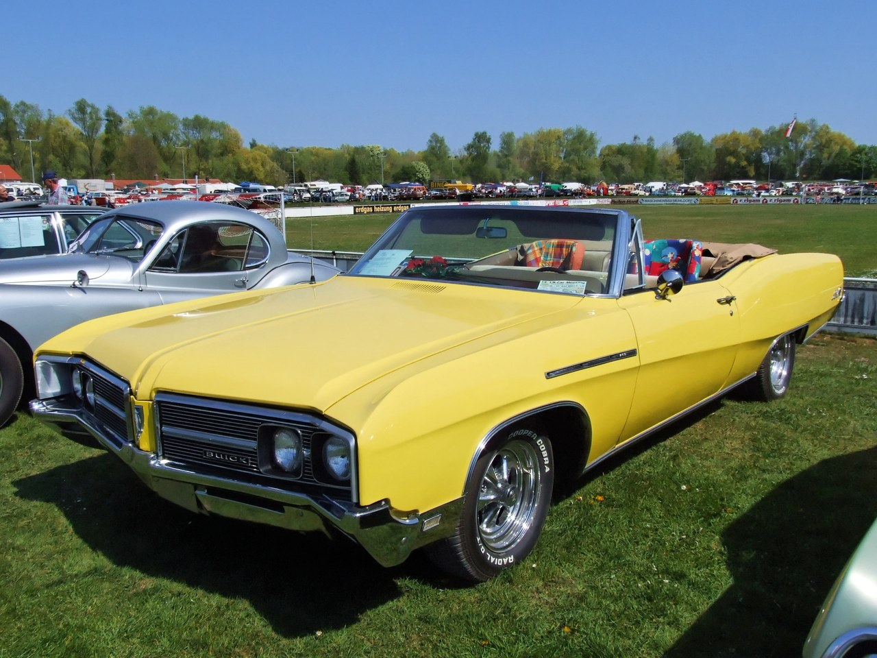 Buick LeSabre Cabriolet (1967) Quelle: selbst fotografiert, 04/2007 Fotograf: Späth Chr.